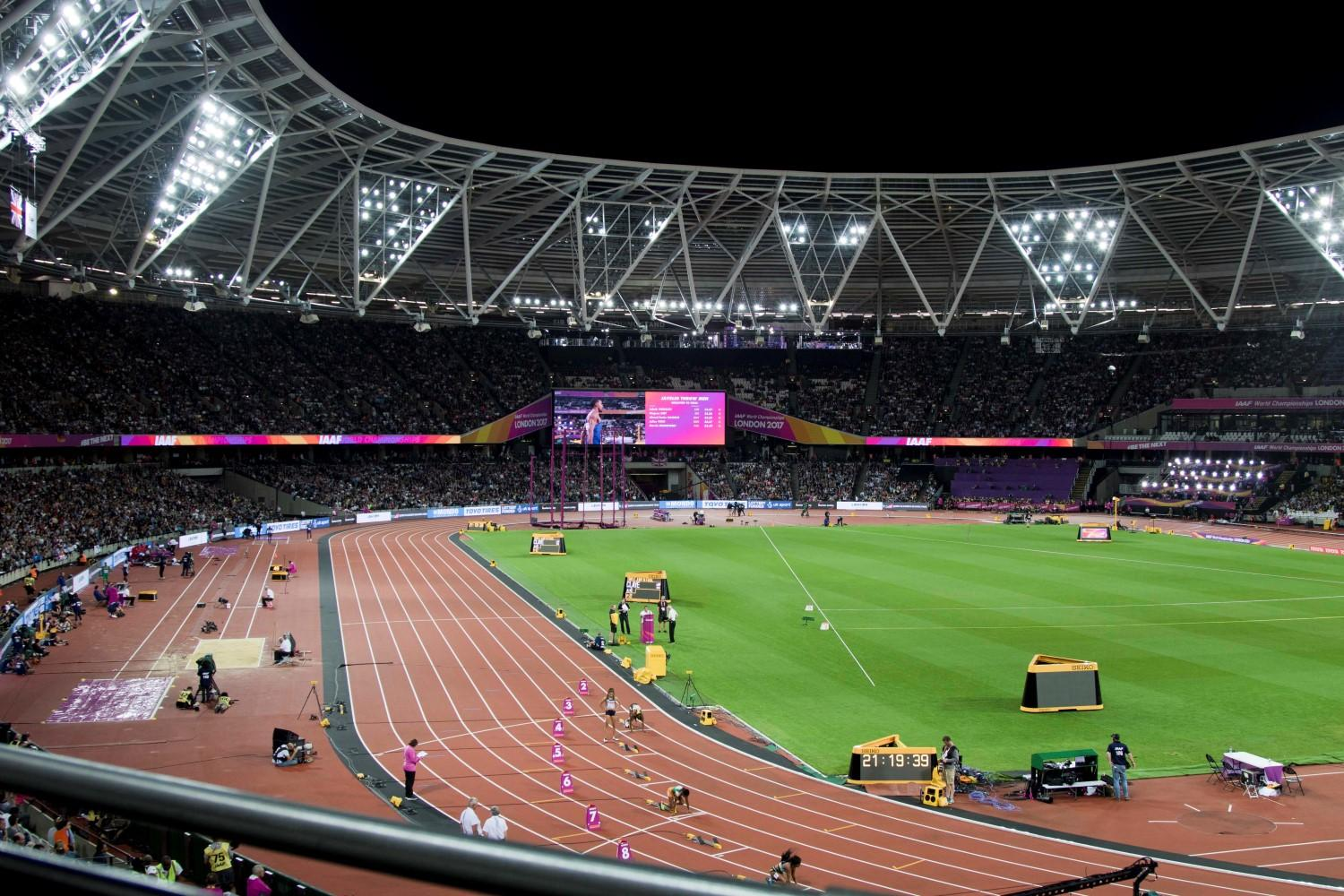 d6_12 stadion